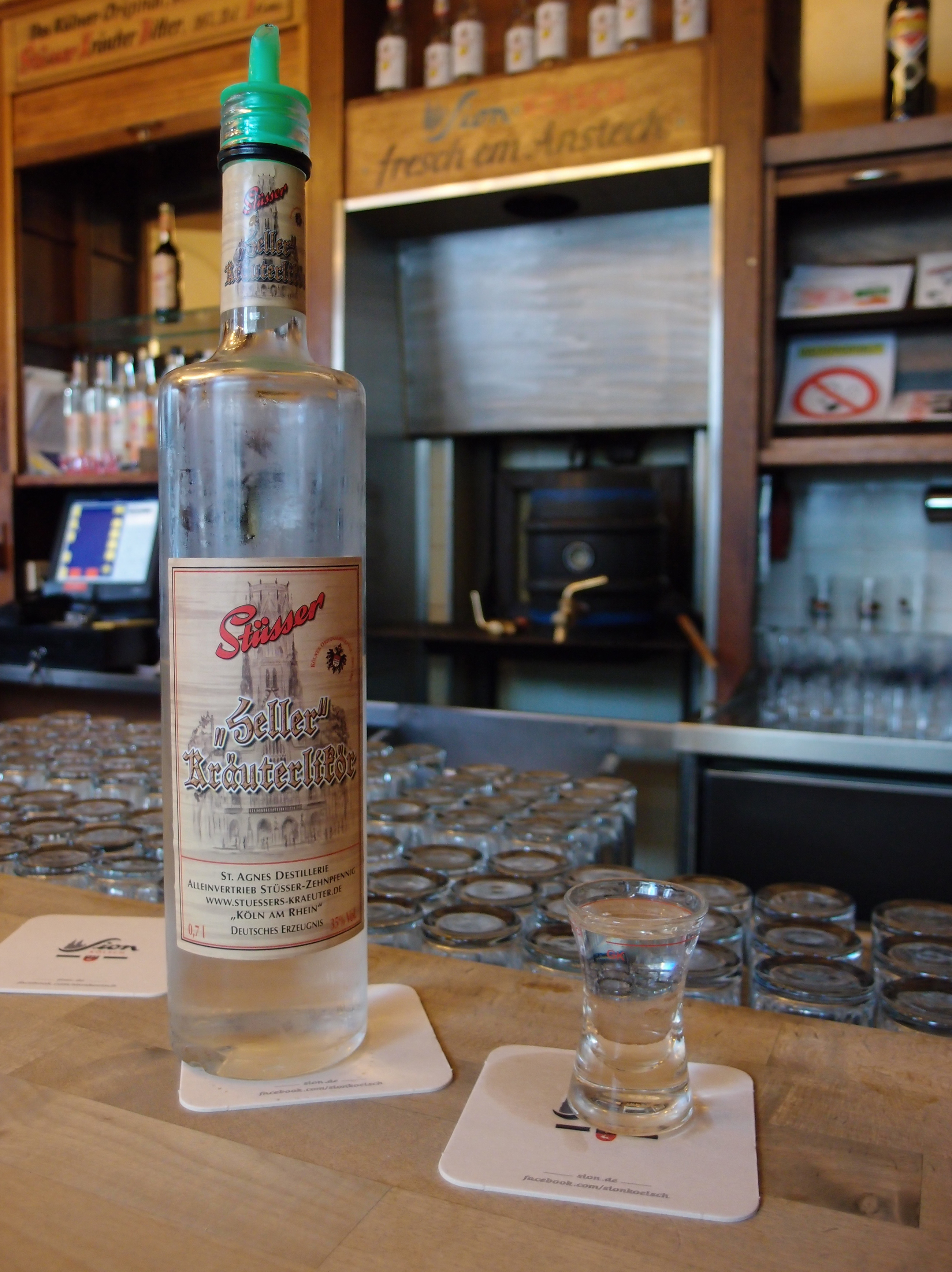 Brauhaus Stüsser im Agnesviertes (Köln) - Stüsser „heller“ Kräuterlikör Datum: 29.12.2012 Urheber: M. Pfeiffer alias Benutzer:Gordito1869 Quelle: privates Fotoarchiv des Urhebers